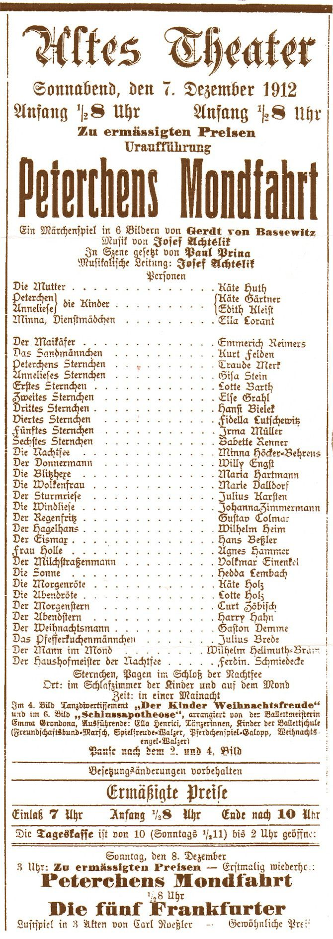 Zeitungsanzeige der Uraufführung von Peterchens Mondfahrt